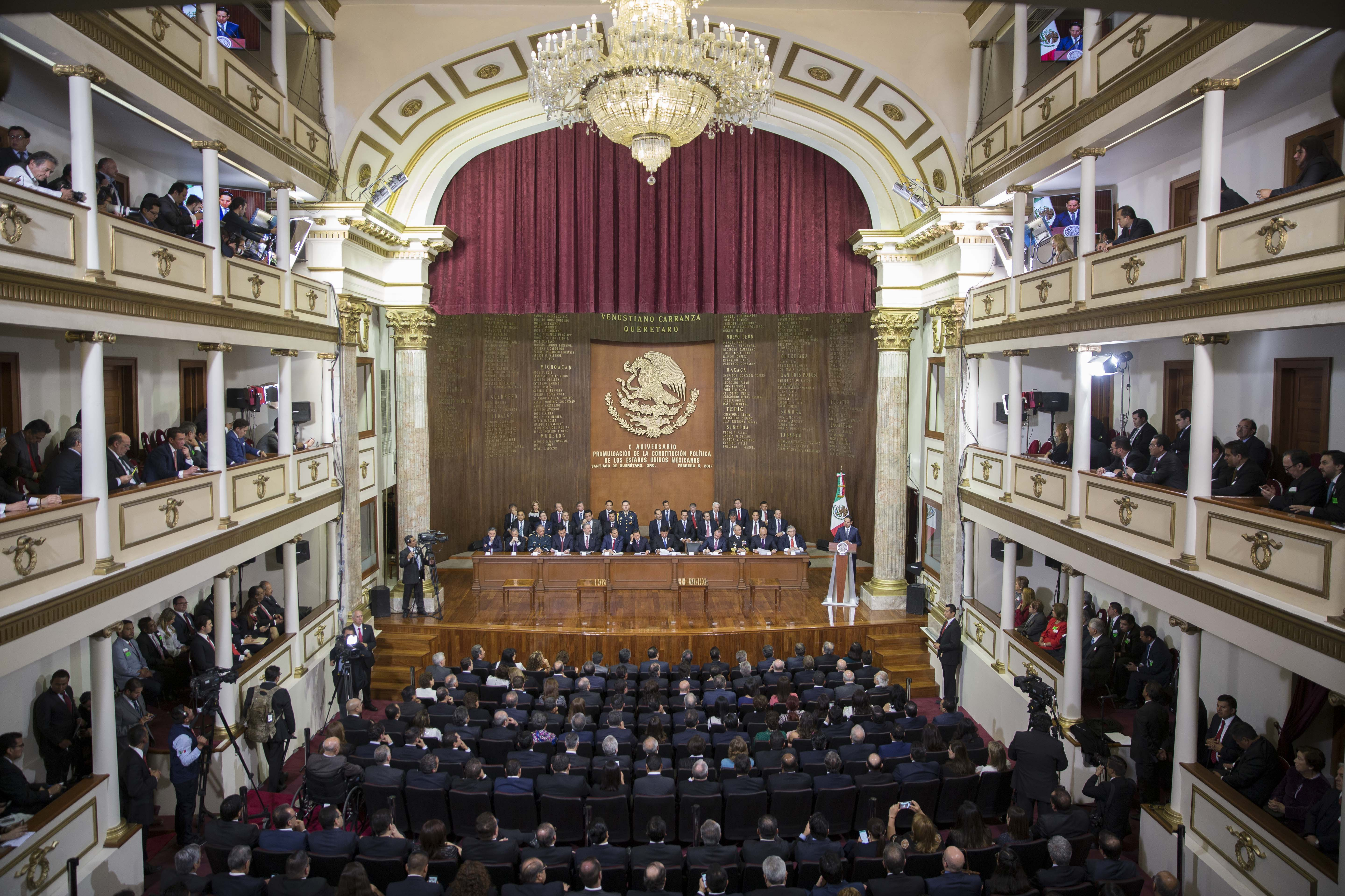 100 Aniversario de la Promulgación de la Constitución Política de los Estados Unidos Mexicanos, Teatro de la República, Santiago de Querétaro.